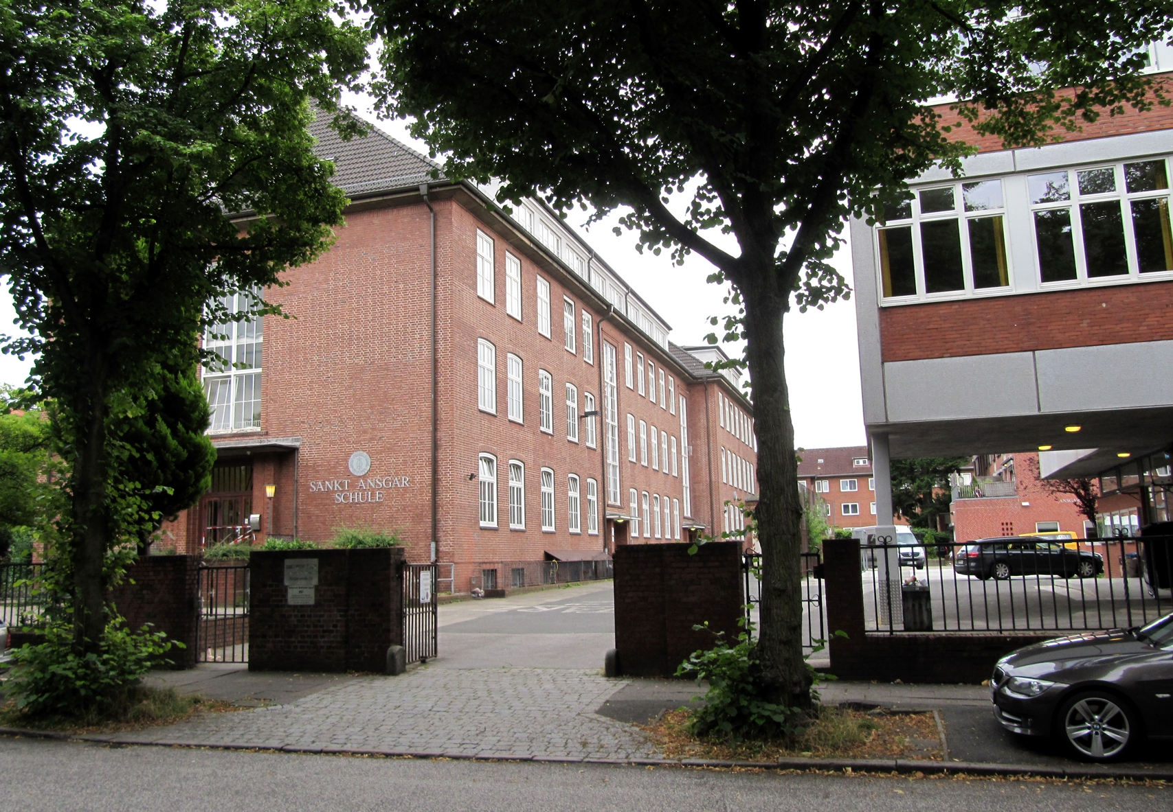 Schulhofauffahrt